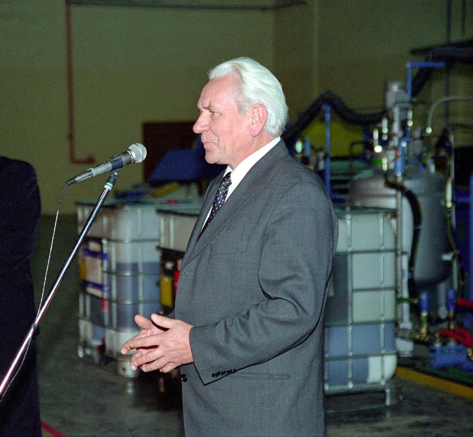 Анатолий Александрович Баракин выступает на презентации ООО «Славтеко». Анатолий Александрович Баракин (26.08.1940—16.08.2010) — окончил Ярославский государственный педагогический институт (1962), учитель физики Брейтовской средней школы, завуч Прозоровской средней школы (1965), заместитель председателя Брейтовского райисполкома (1968—?), заместитель начальника, начальник управления бытового обслуживания населения Ярославского облисполкома (1975—1989), заместитель председателя облисполкома (1989—1991), заместитель главы администрации Ярославской области (1991—1996), заместитель председателя правительства области (1996—?), заместитель губернатора Ярославской области. Заслуженный работник бытового обслуживания населения Российской Федерации (1998).